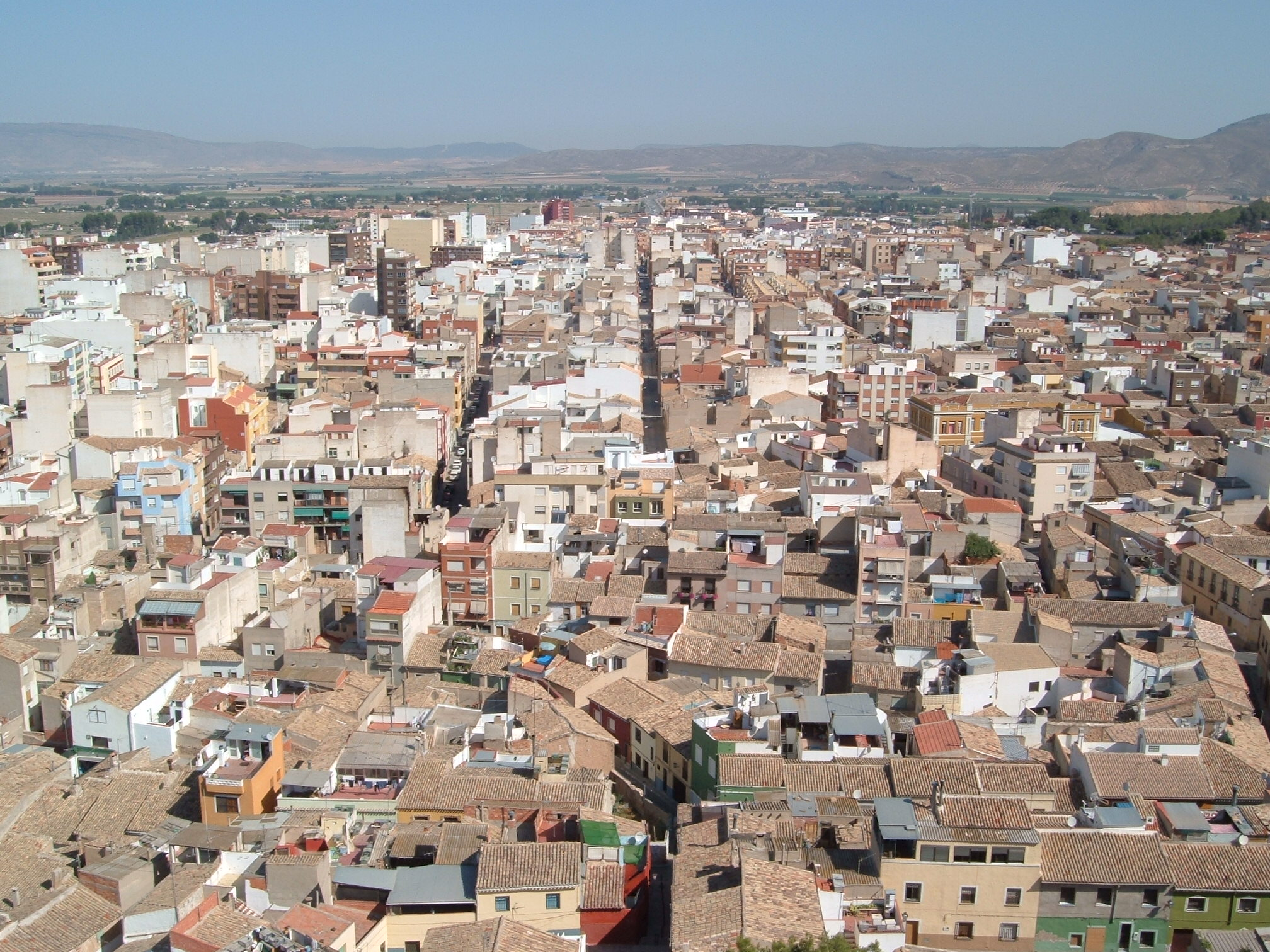 Villena desde la torre del castillo de la Atalaya, hacia el noroeste.